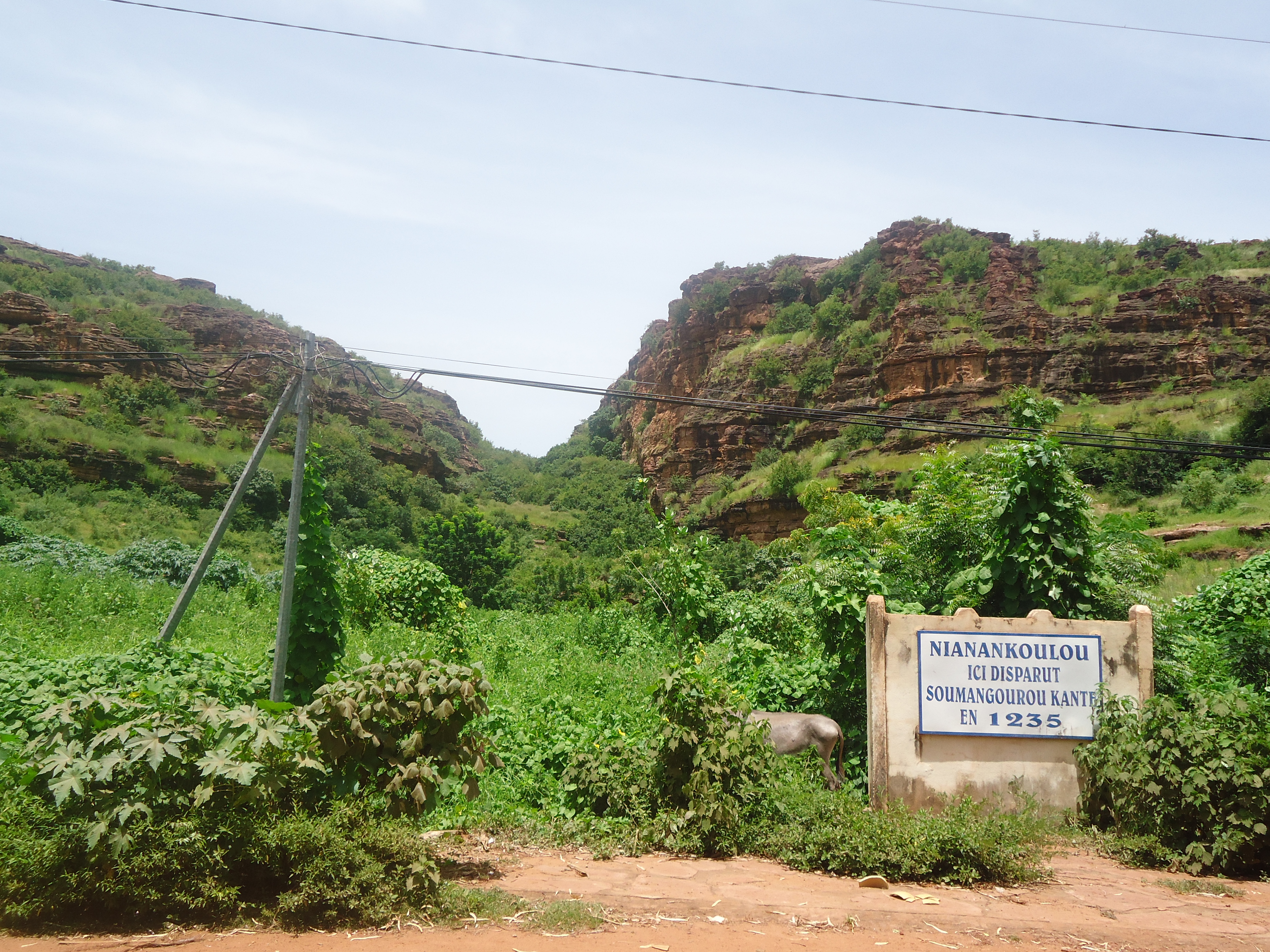 selon la légende c'est sur ce site à Koulikoro (Mali) où a disparu mystérieusement le roi Soumangourou Kanté en 1235